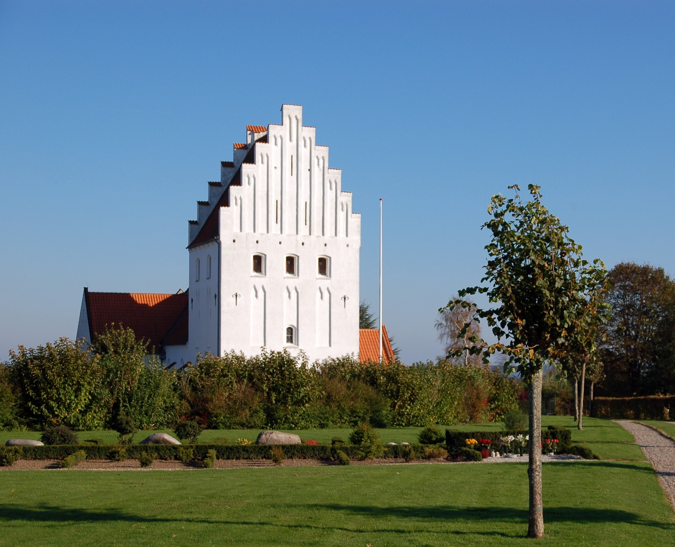 Rinkenæs Church, Denmark